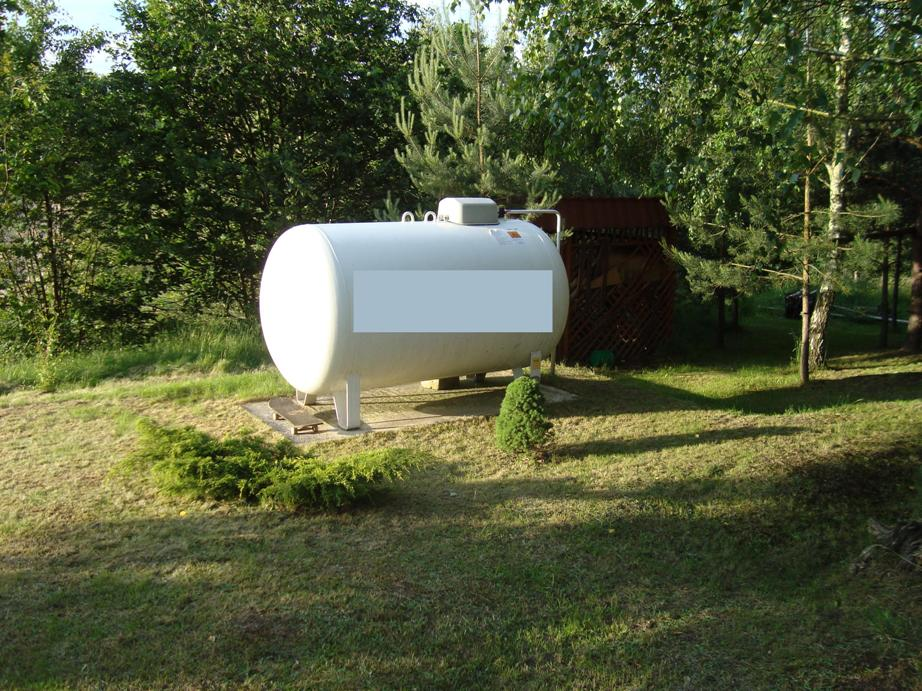 Zbiornik gazu na betonowym fundamencie.